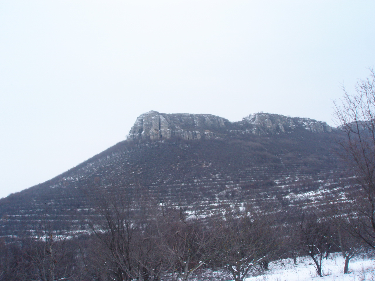 Част от местността "Големият Камък" с.Смочан-Ловешко.Този вид скали и възвишения преобладават в тази област характерна с хълмисто-планинския си релеф-типично за Предбалкана!